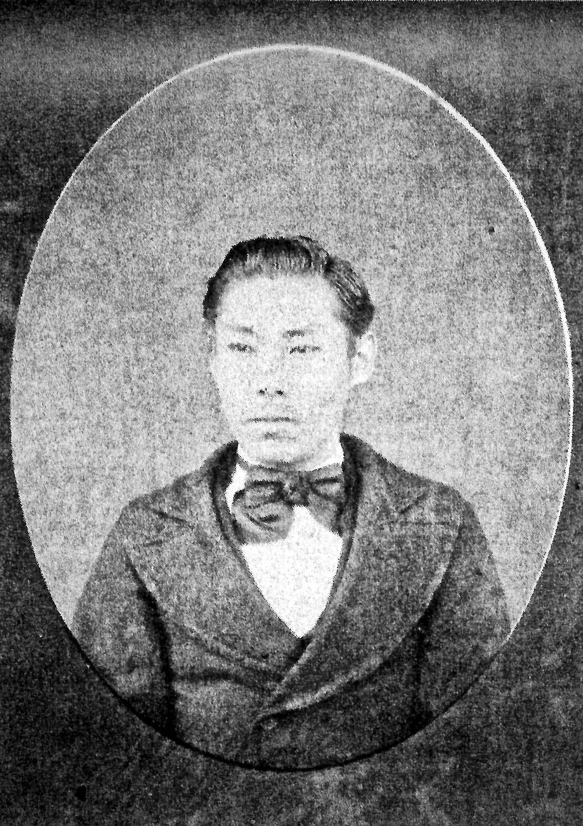 平松時厚の肖像写真。